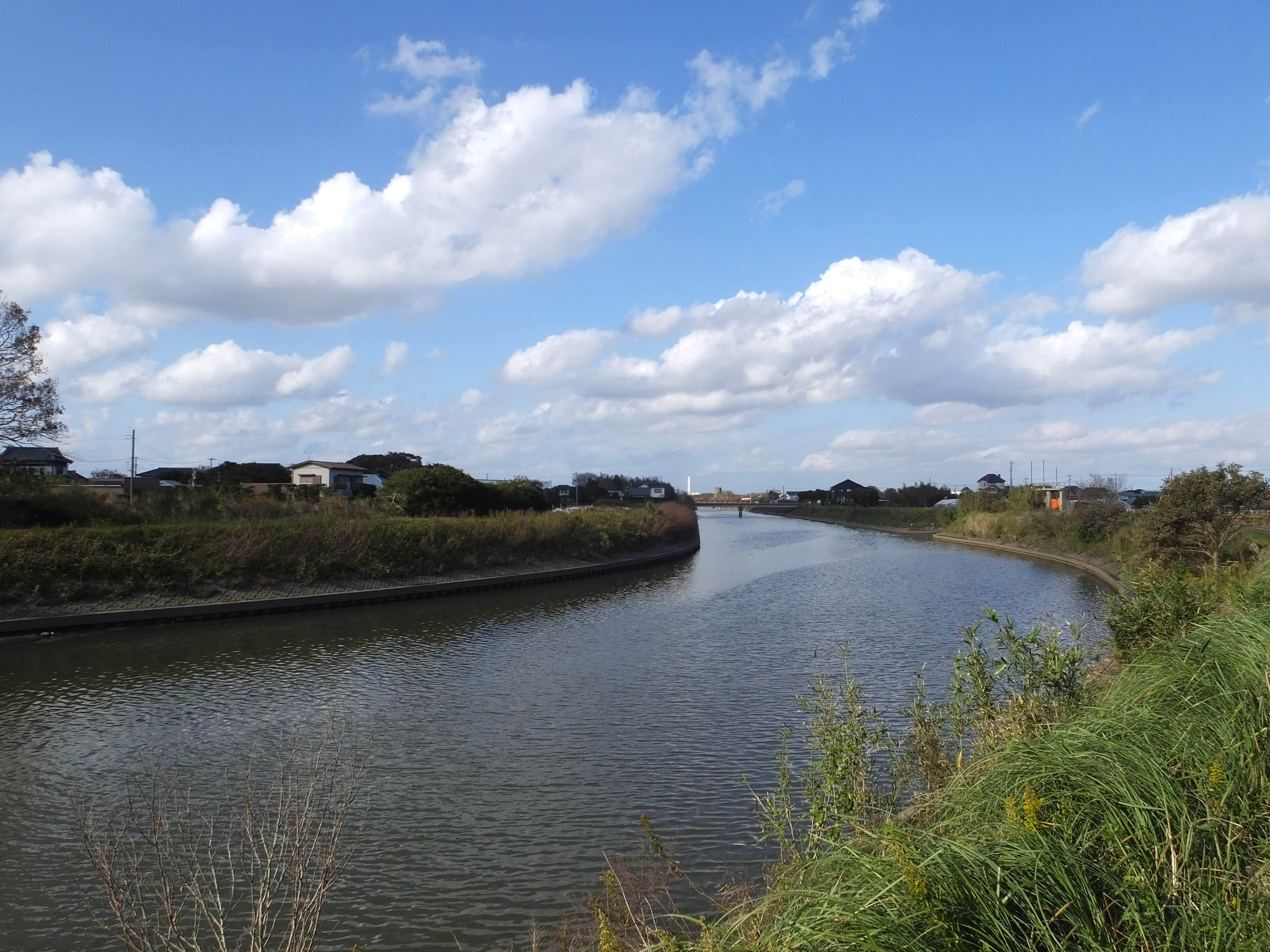 新川（仁玉川合流点付近、千葉県旭市仁玉（にったま））